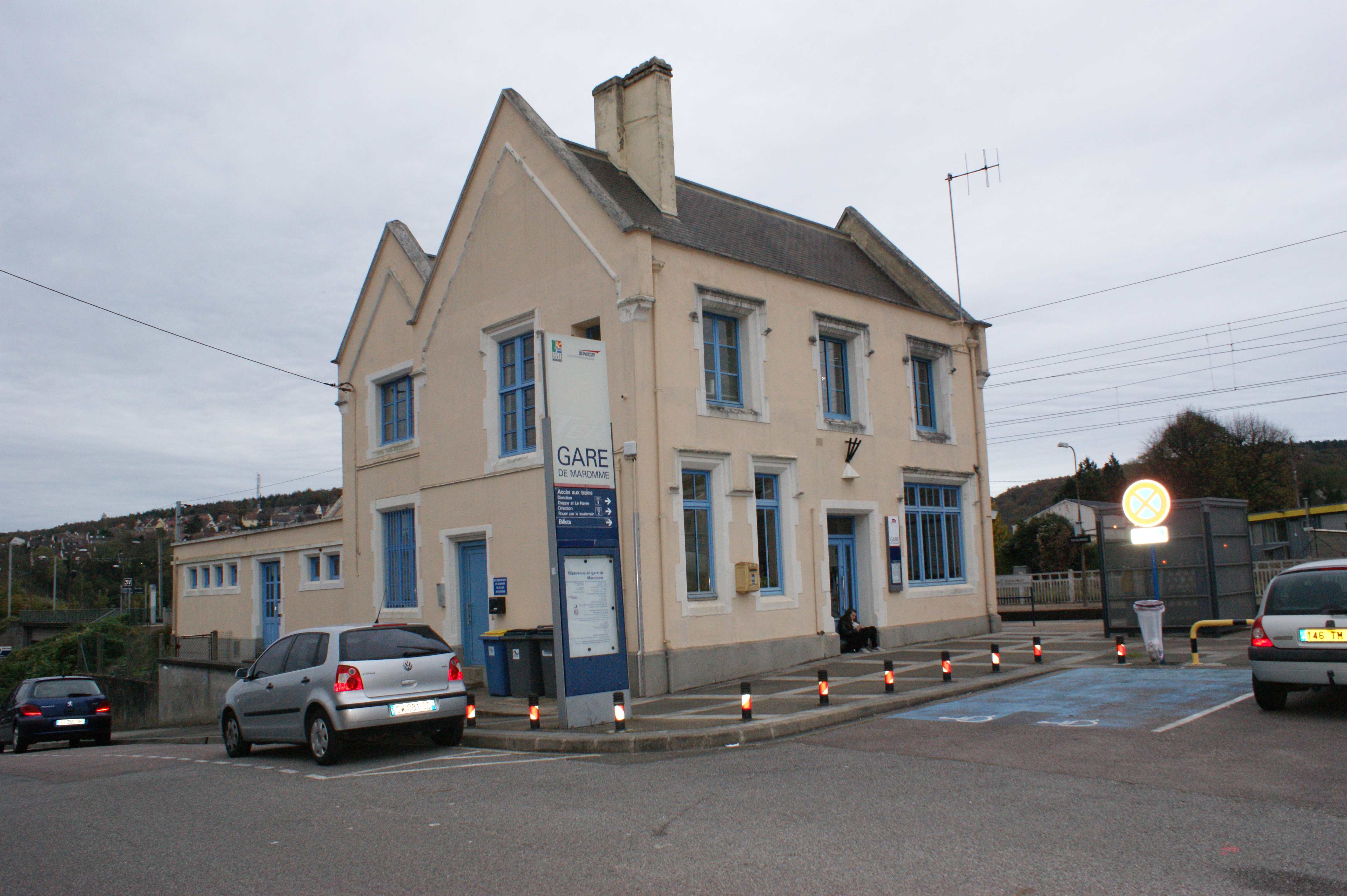 Gare de Maromme, bâtiment voyageurs et entrée de la gare.